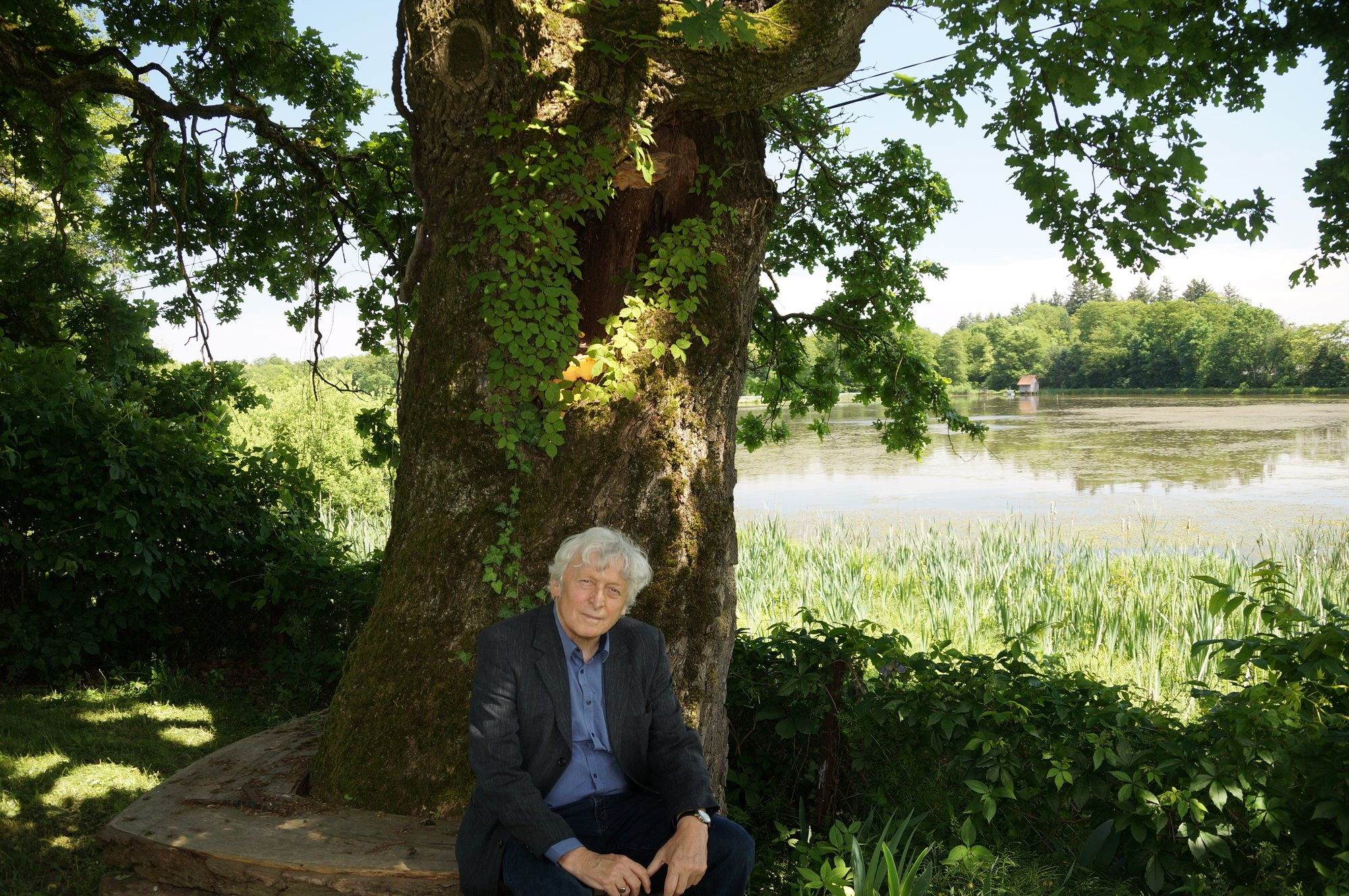 Alfred Kolleritsch vor der Eiche bei seinem Heimathaus in Brunnsee; Foto von Julian Kolleritsch, Sohn von Alfred Kolleritsch